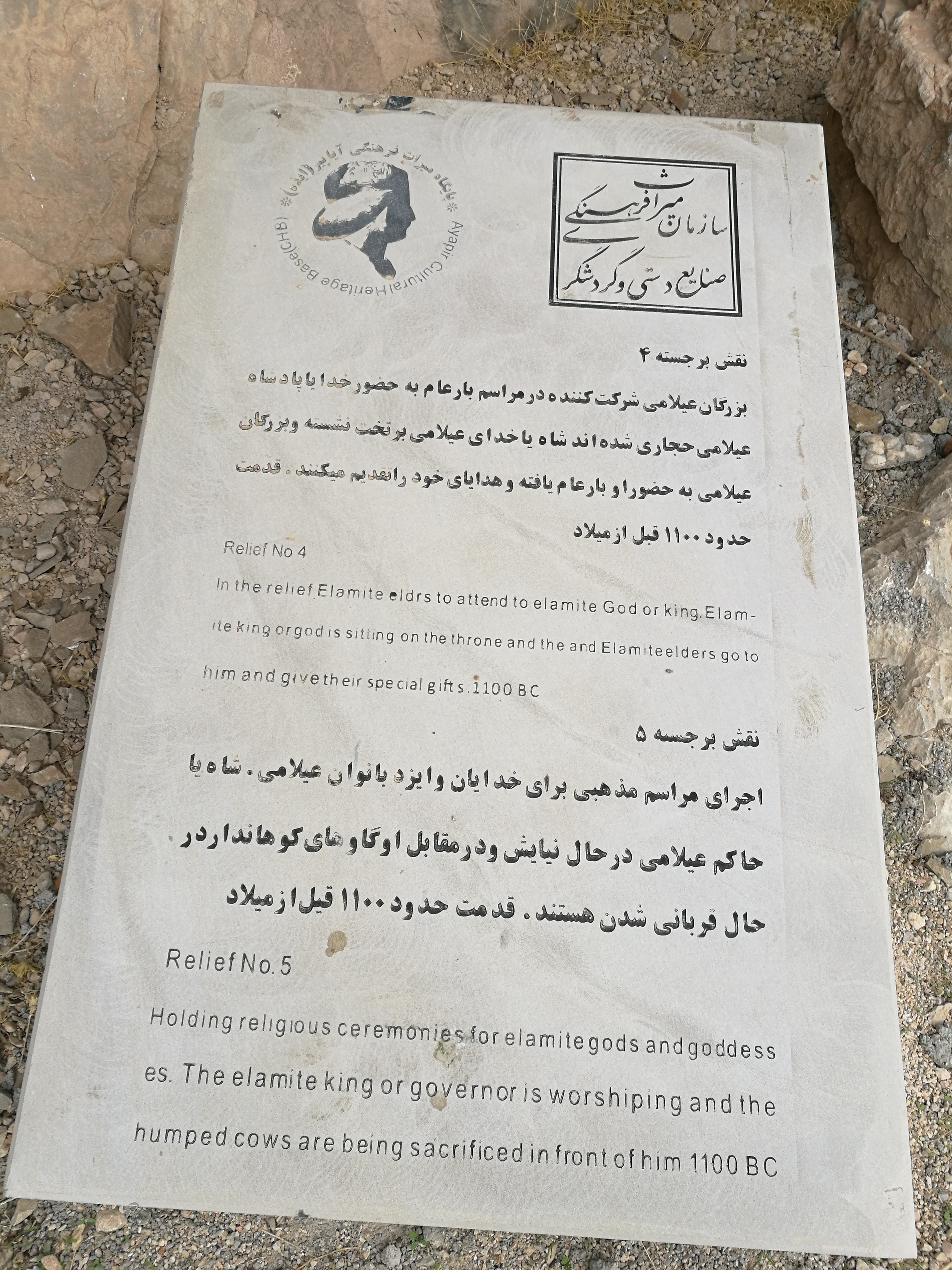 سنگ‌نوشته راهنما در منطقه توریستی کول فرح